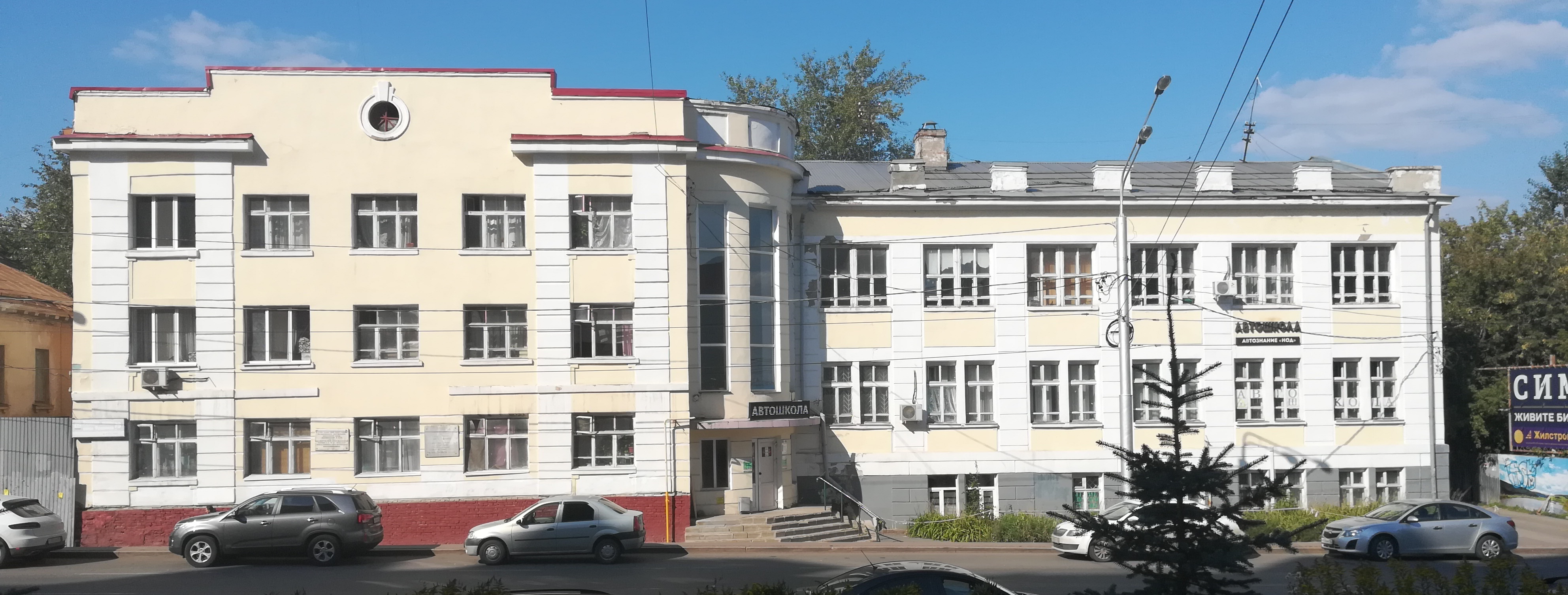 Уфа. Здание на улице Пушкина